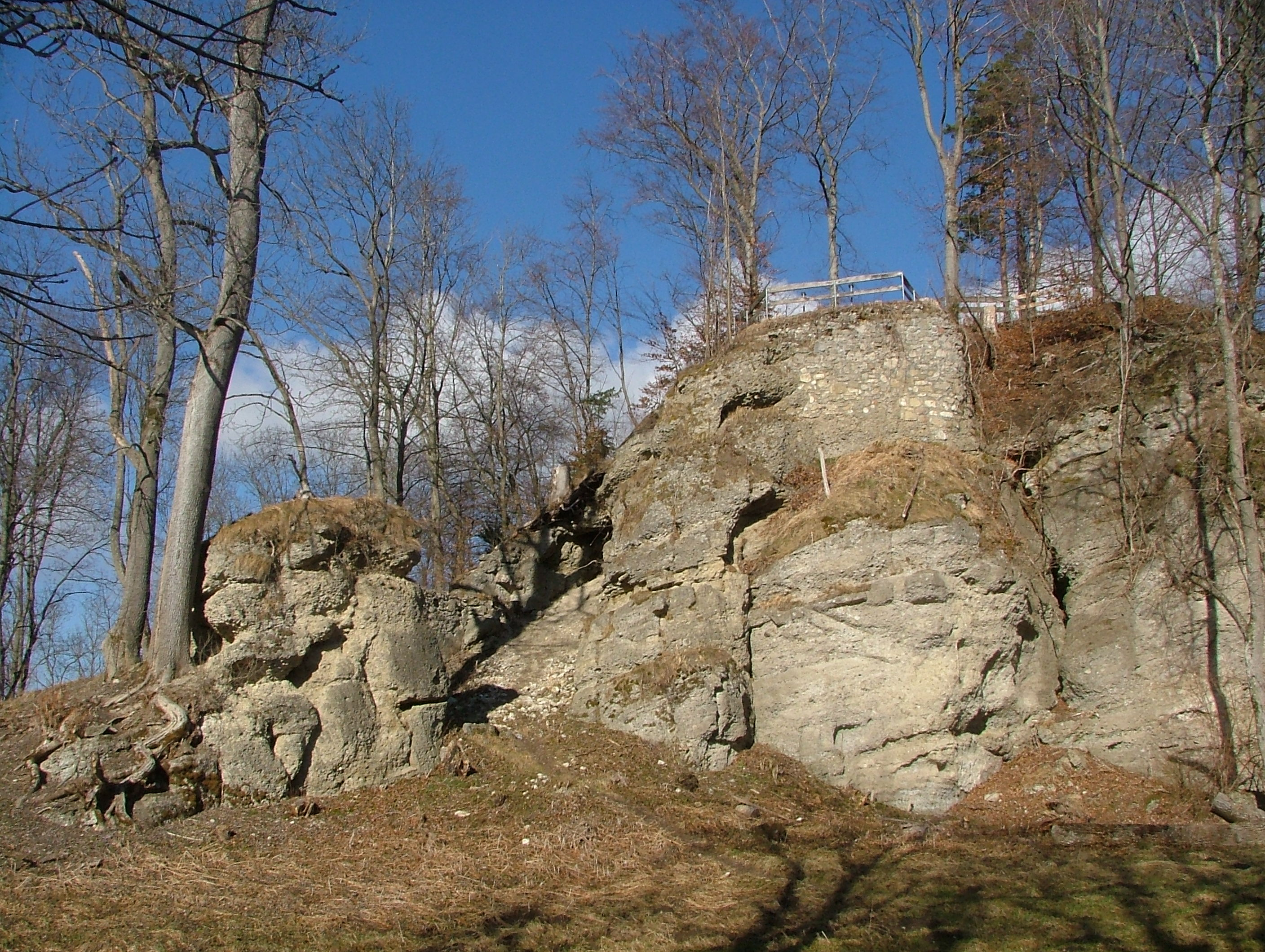 Wagegg